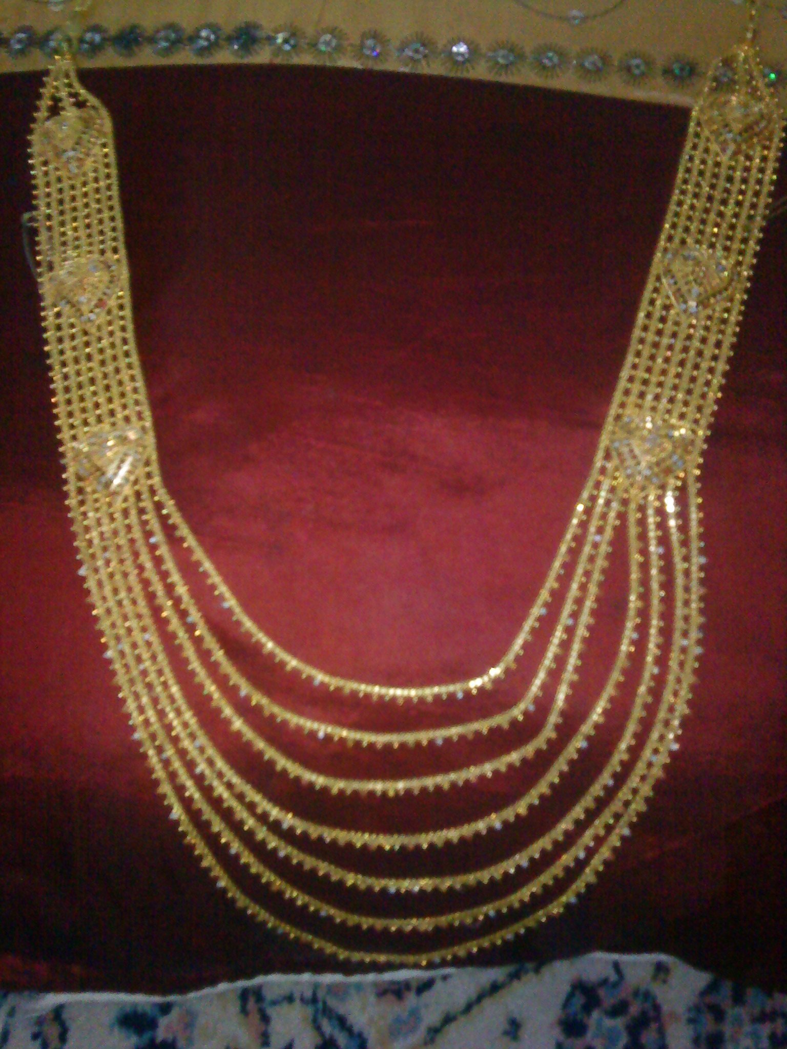 سینه ریز طلای ساخت دست بلوچ